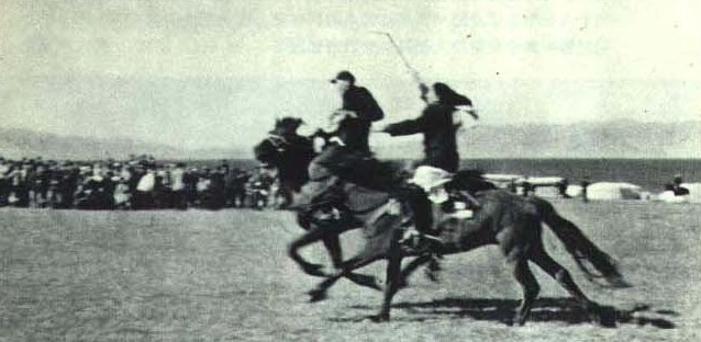 1963-04 1963年 姑娘追